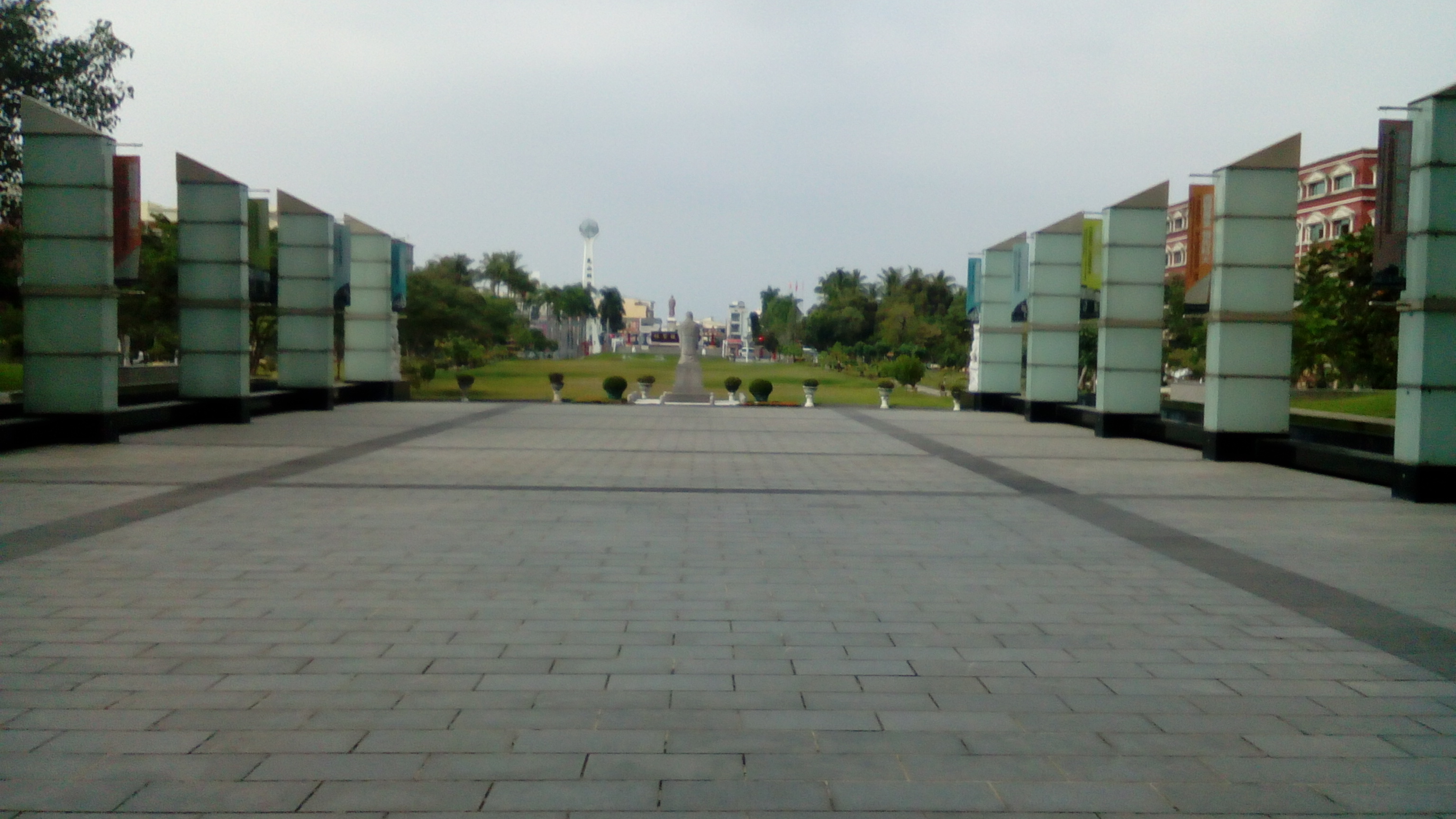 即中庭 遠處四字為「科學維揚」